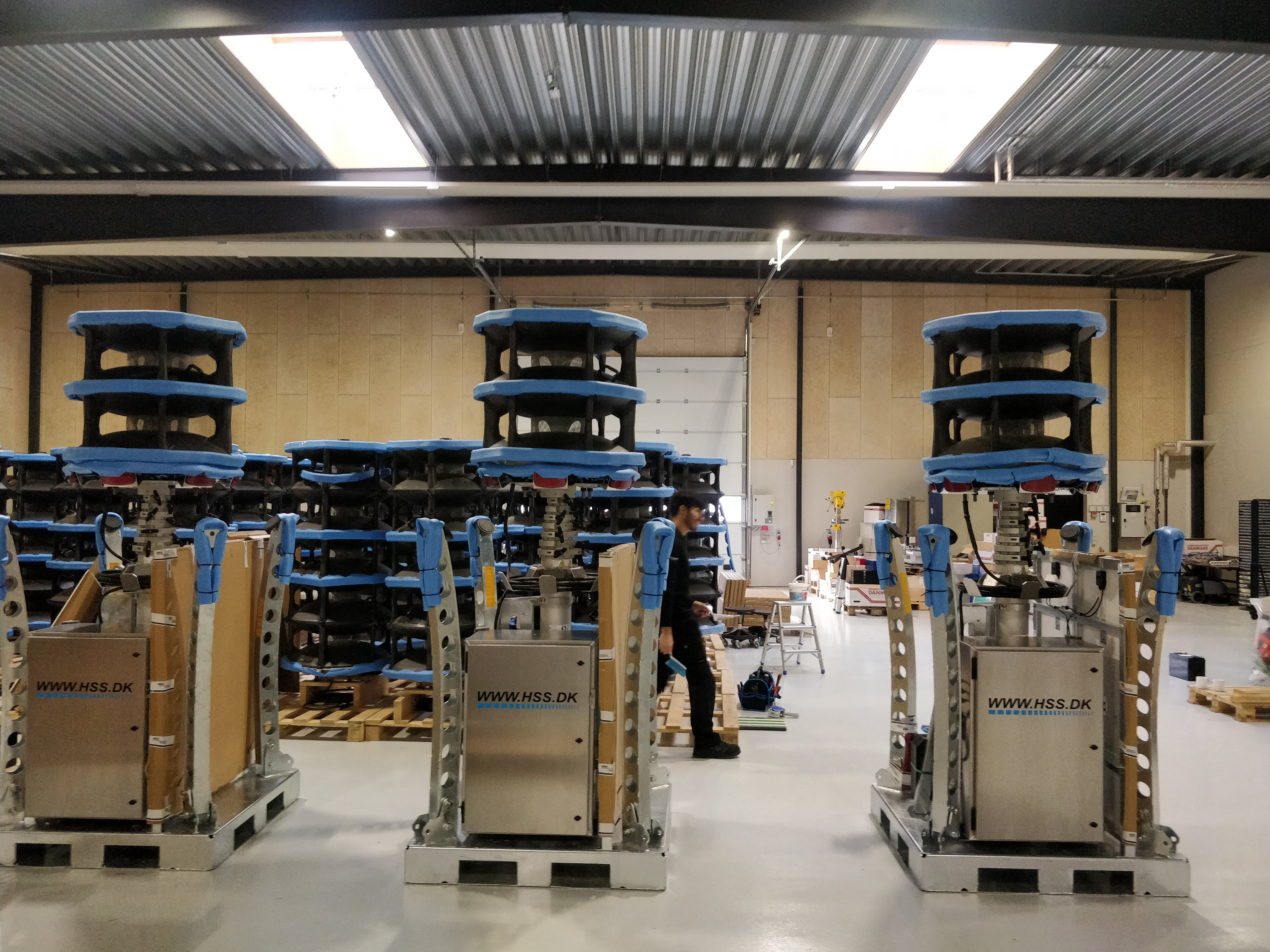 La sirenas de HSS son utilizadas para alerta temprana en eventos de desastres naturales